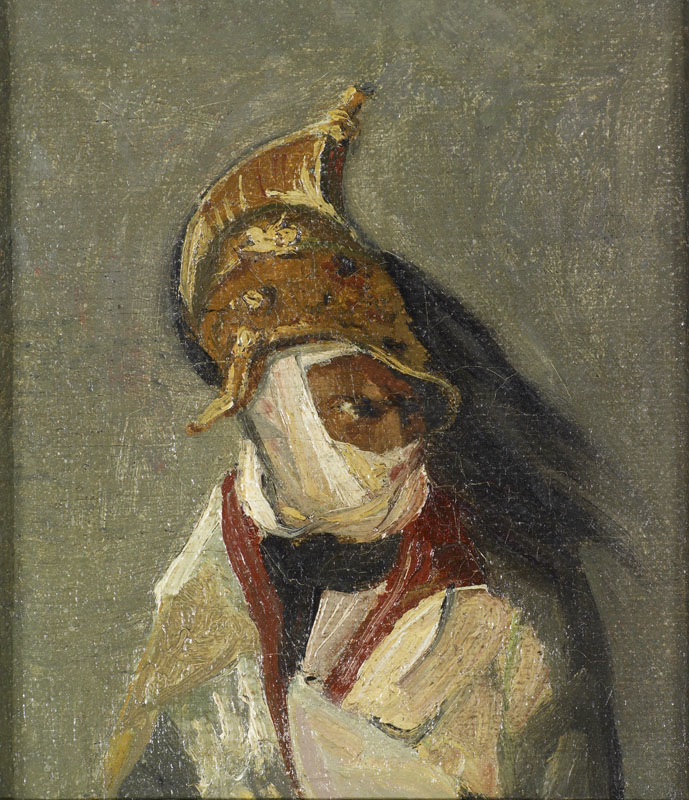 Cette petite peinture est une étude de Géricault d’après l’un des cuirassiers du tableau d’Horace Vernet, "La Barrière de Clichy. Défense de Paris, le 30 mars 1814", signé et daté de 1820 (Paris, Musée du Louvre). En dépit du sujet, elle ne peut donc être mise en rapport avec le "Cuirassier blessé" réalisé par Géricault en 1814 et ne peut être située qu’à partir de 1820. En raison de sa facture, Philippe Grunchec (1975) a placé cette oeuvre après le retour de l’artiste d’Angleterre, vers 1822-1823. En effet, Géricault, qui passa dans l’atelier de Carle Vernet de 1808 à 1810, a été très lié avec le fils du peintre, Horace Vernet (1789-1863) avec lequel il partageait une véritable passion pour les chevaux et les sujets militaires.